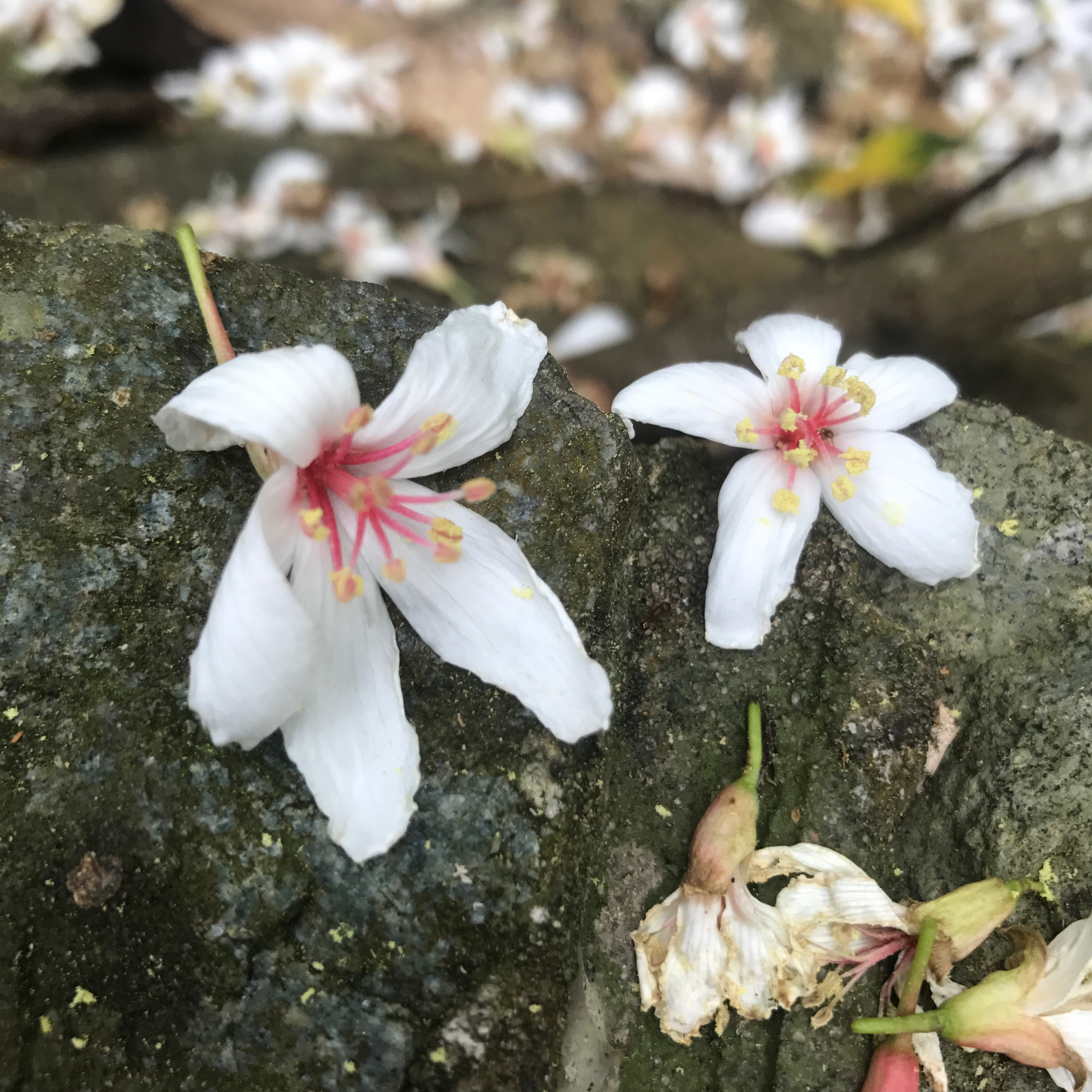 中文（台灣）: 湖口鄉油桐花